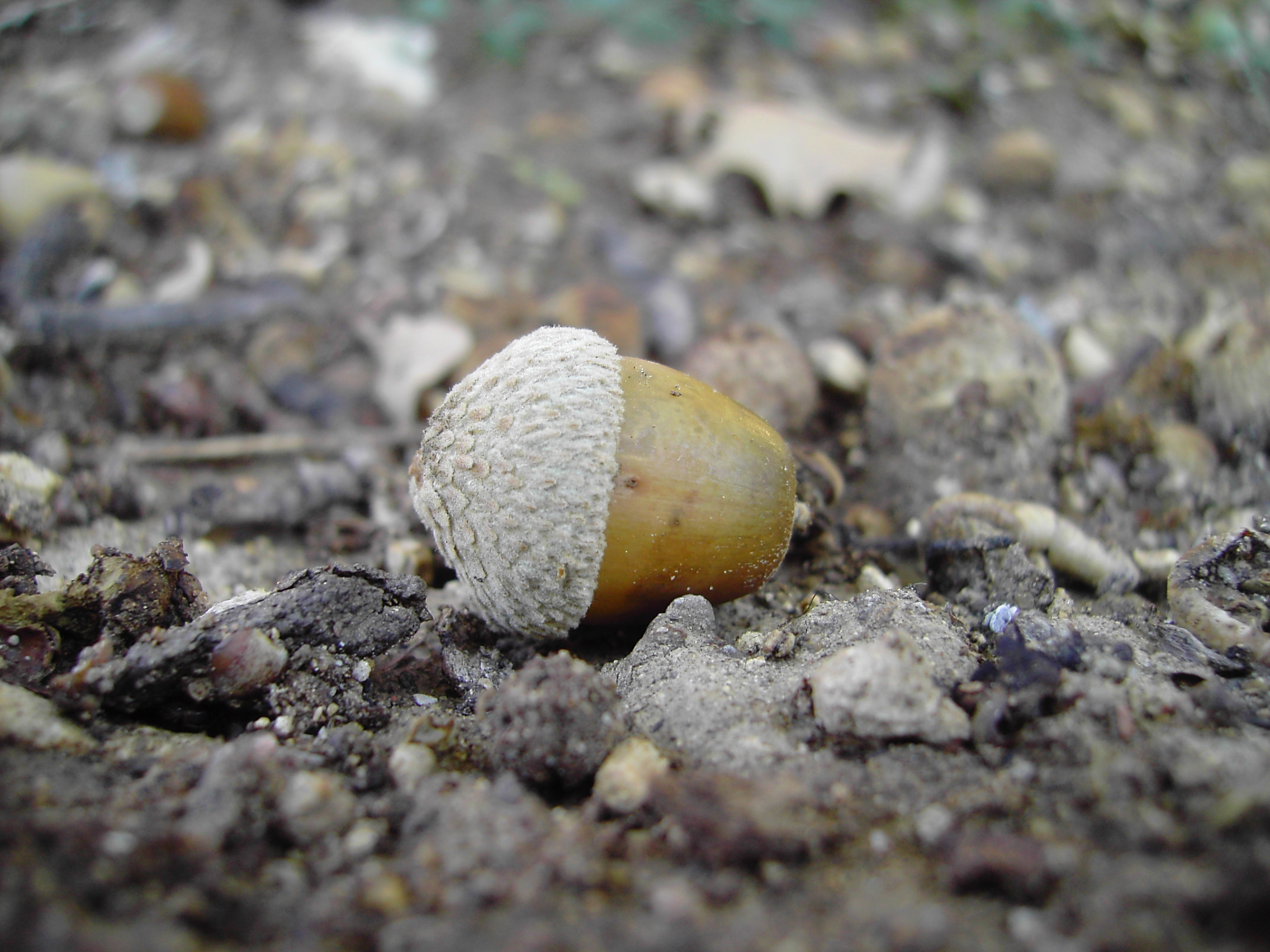 Quercus